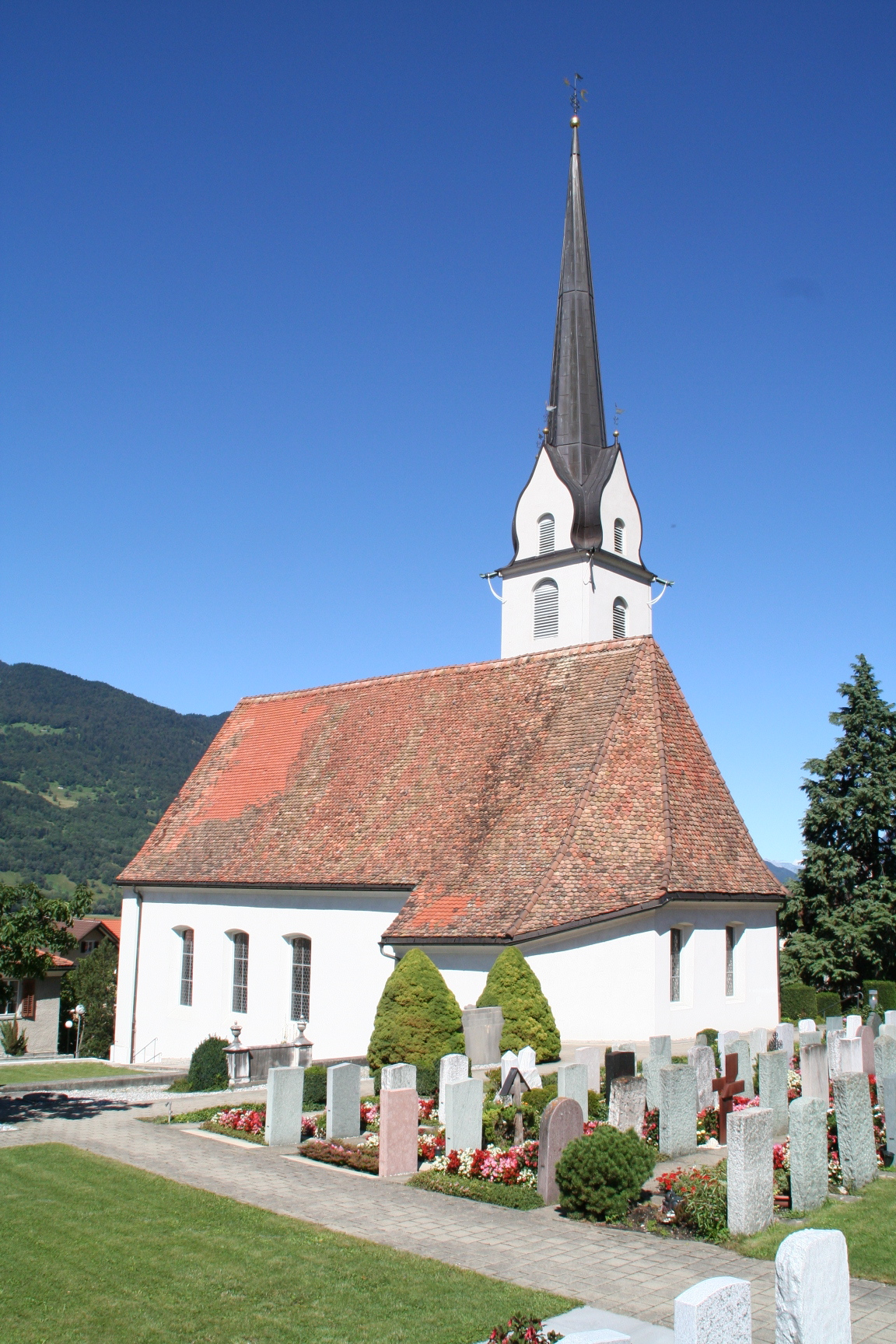 katholische Kirche Zizers